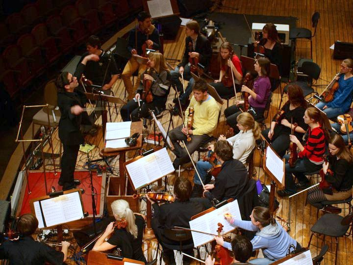 Rudolfinum, Marios Christou (diriguje Missa Graeca)